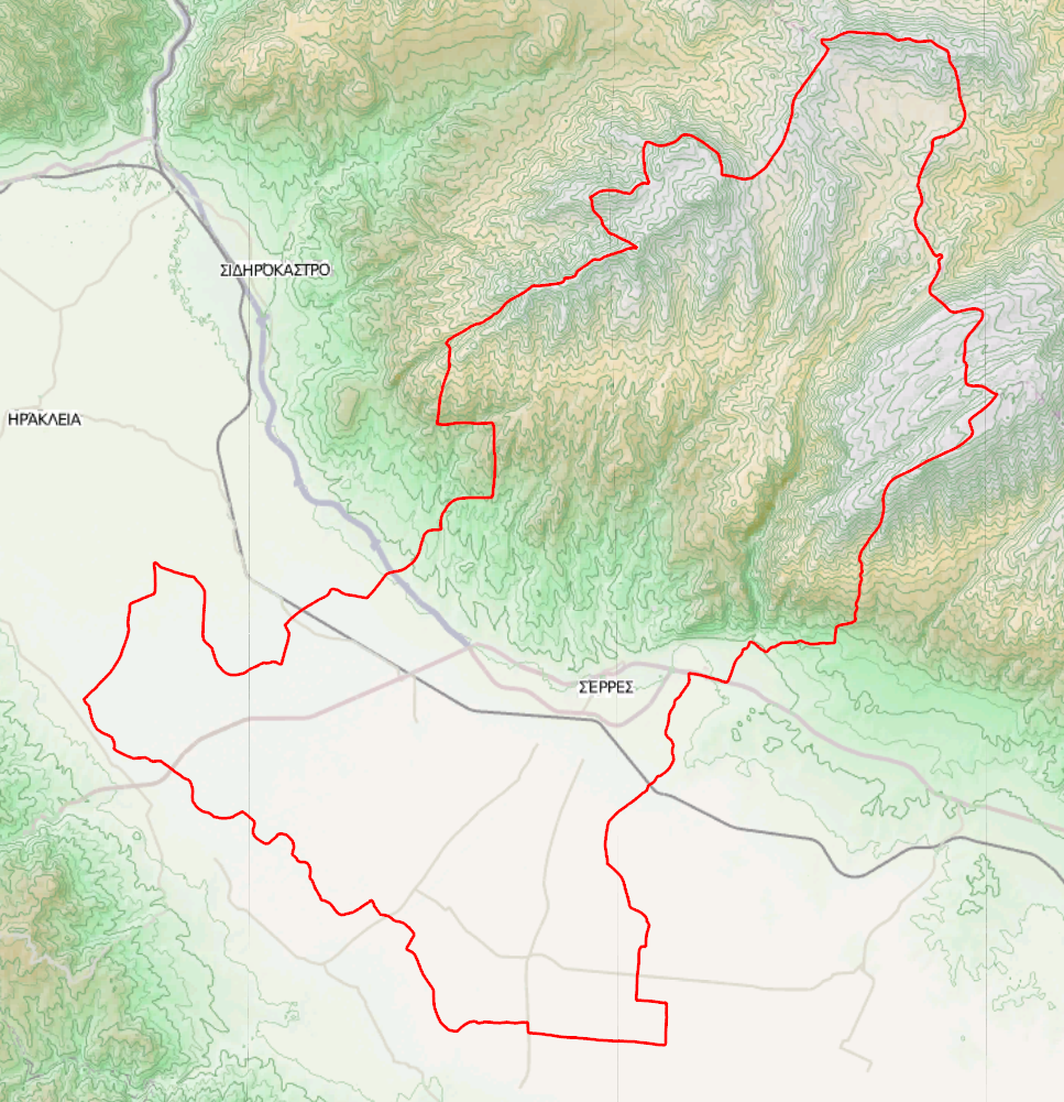 Τοπογραφικός χάρτης του Δήμου Σερρών